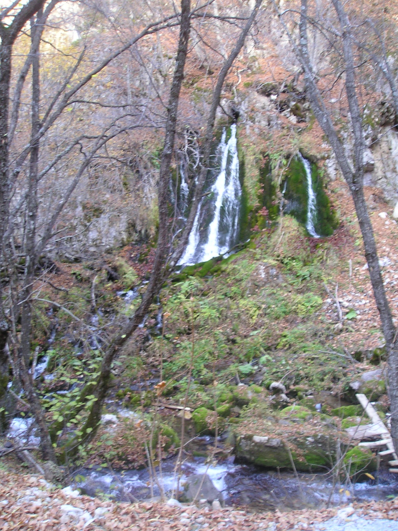 Изворишниот дел на Тресонечка Река